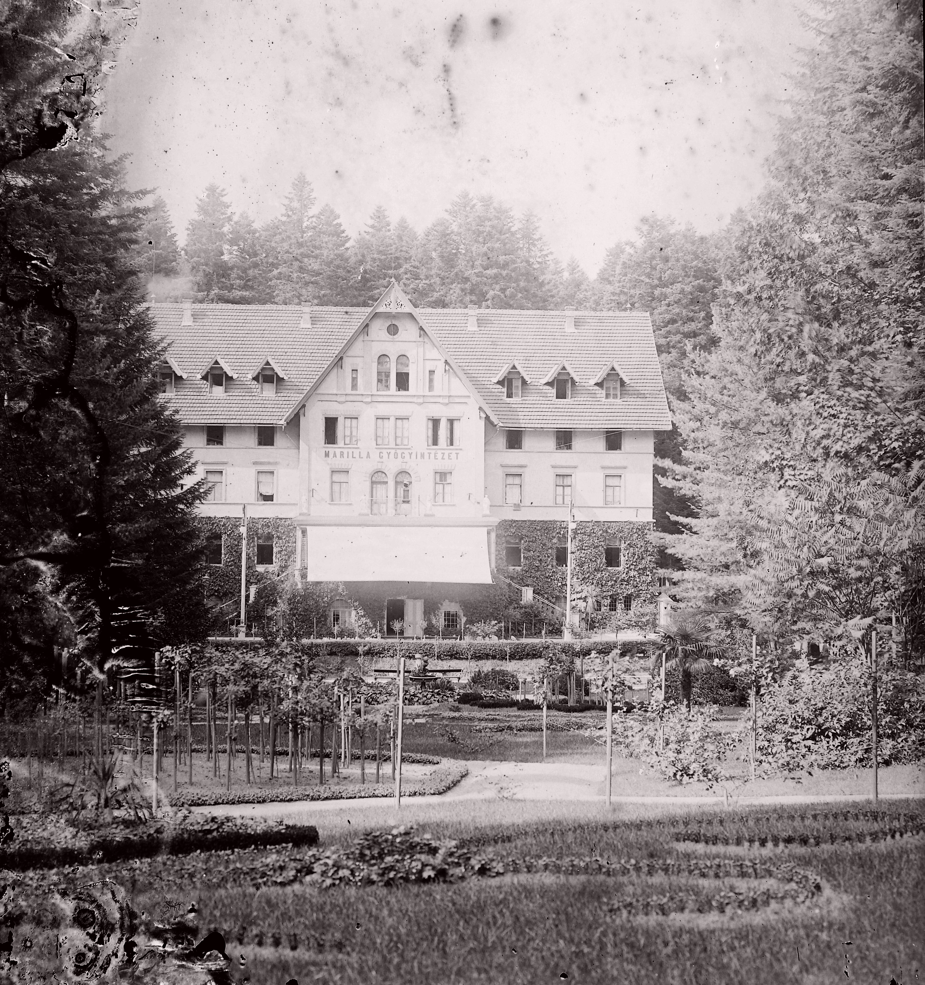 Marillavölgy, szanatórium. Location: Romania, Transylvania, Oravita Tags: medical institution Title: Marillavölgy, szanatórium.